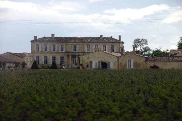 Chateau Branaire-Ducru